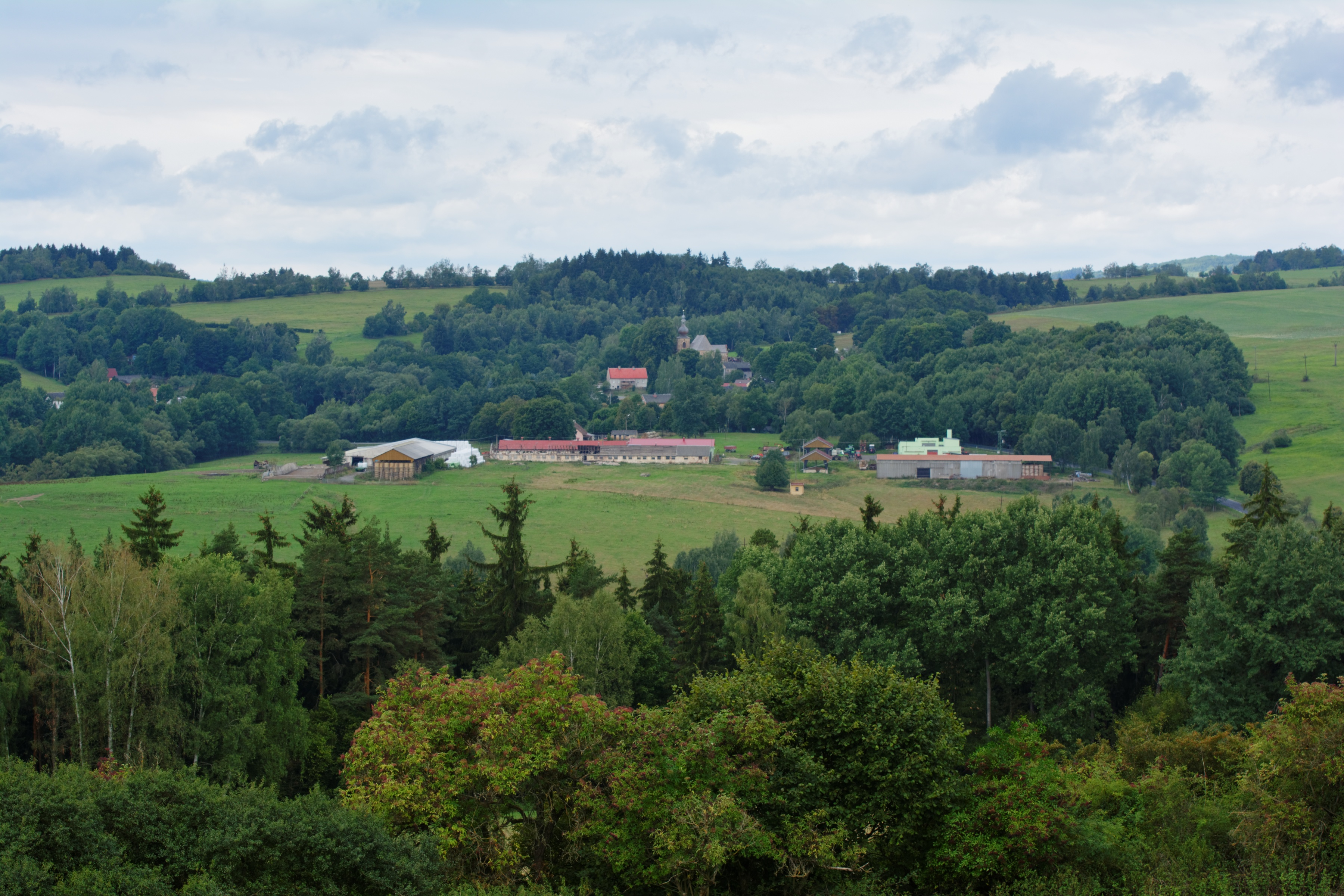 Kozlov u Bochova, pohled od východu.